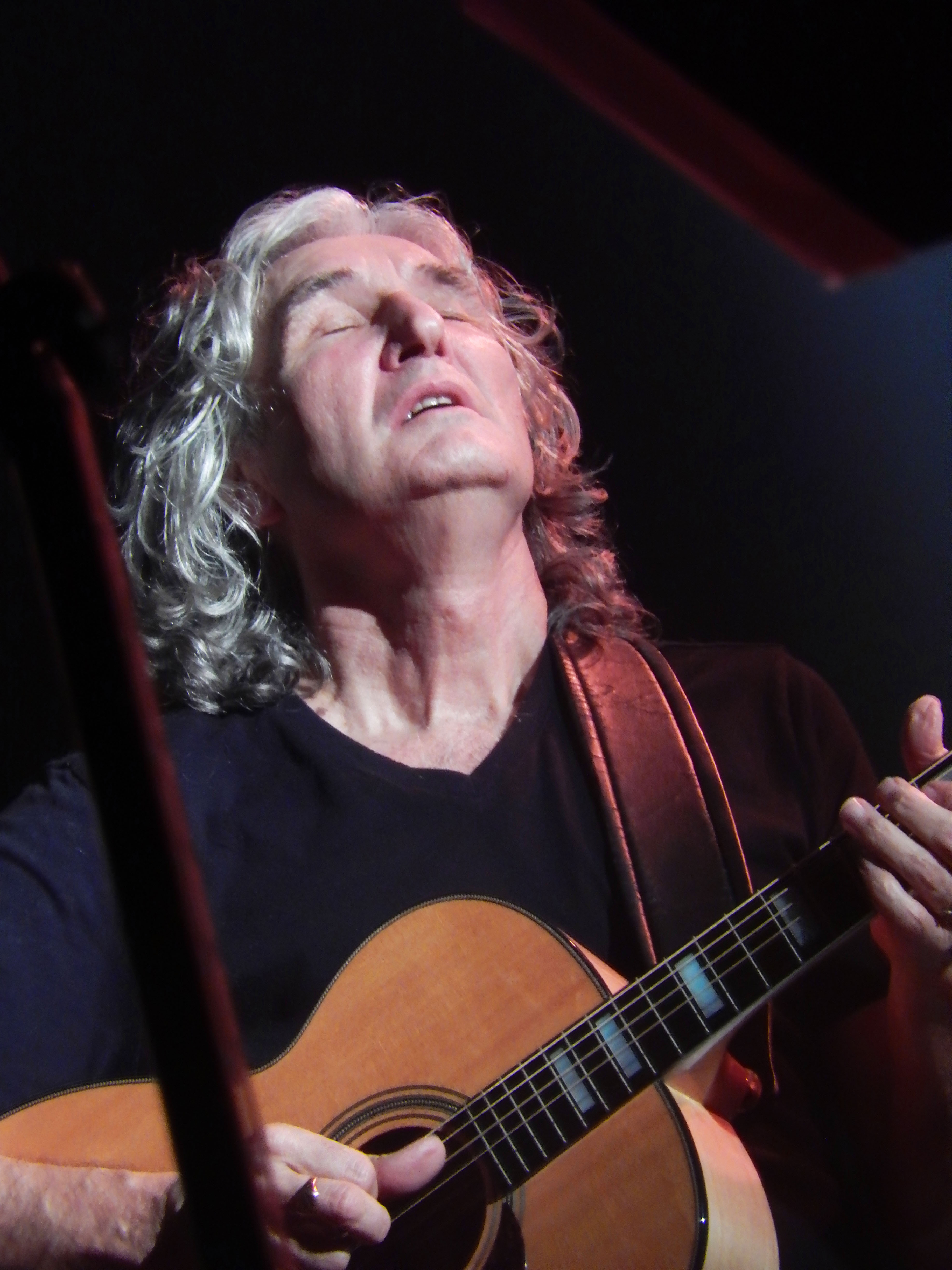 Phil Palmer avec Murray Head en concert à Louvigné du Désert en 2017